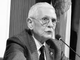 Ramón MARURI VILLANUEVA, HISTORIADOR ESPAÑOL UNIVERSIDAD DE CANTABRIA